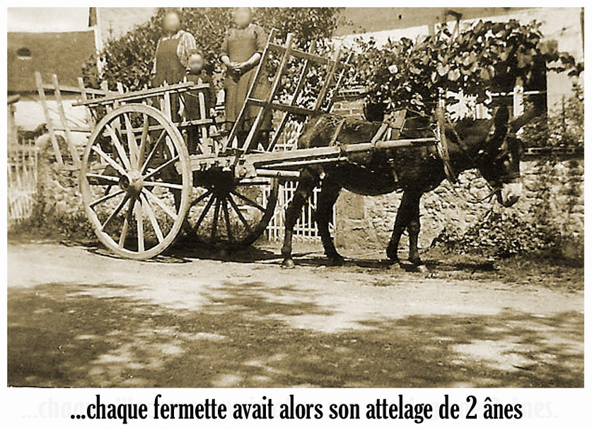 Il n'y avait plus d'attelages de bœufs dans le village: quelques attelages de chevaux, mais toutes les petites "locatures" utilisaient un attelage de 2 ânes (ou mulets plus rarement).